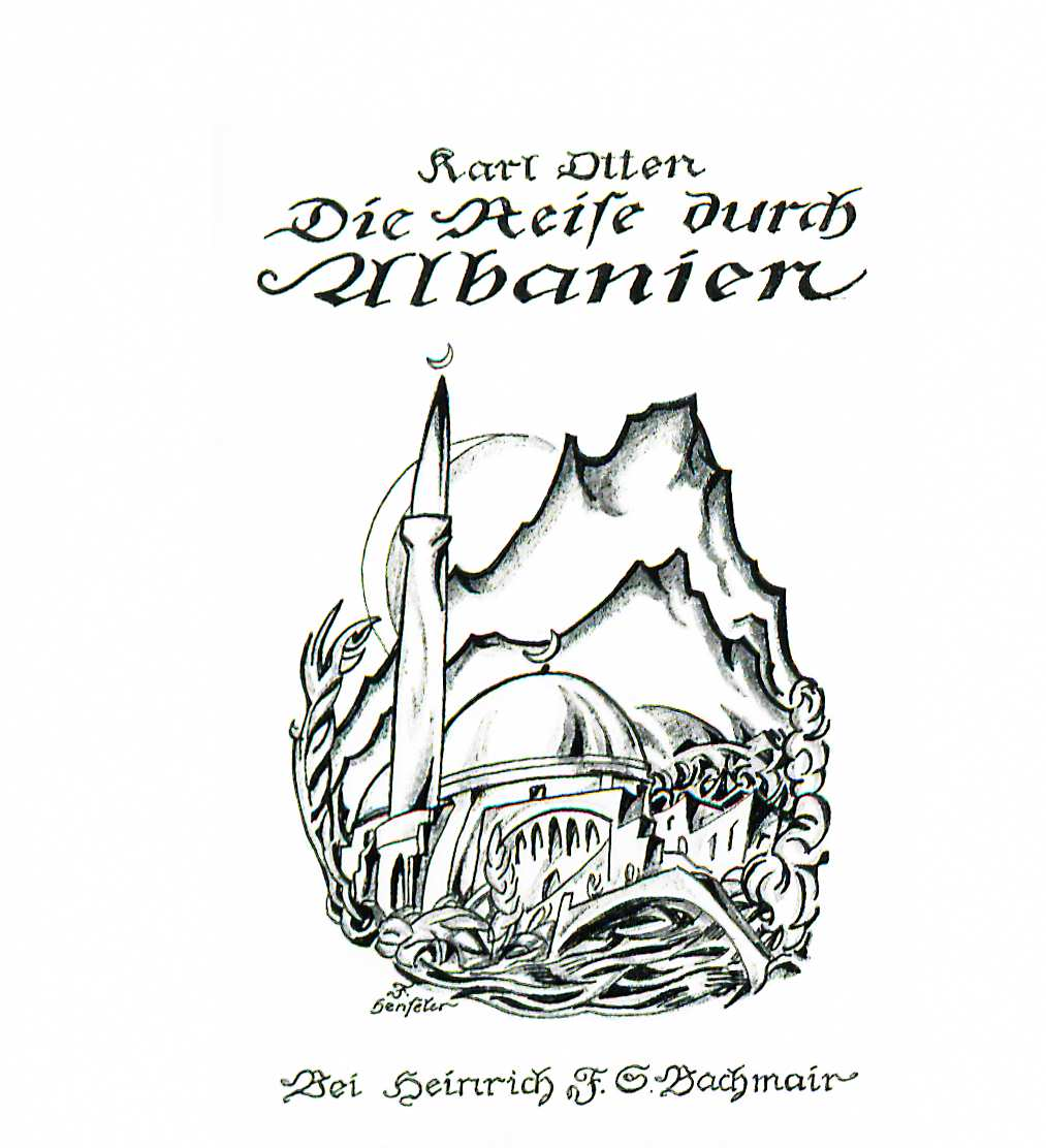 Karl Otten: Die Reise nach Albanien. Umschlagzeichnung von Franz Seraph Henseler, Heinrich F. S. Bachmair-Verlag, 1913